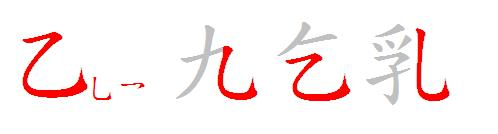 乙部